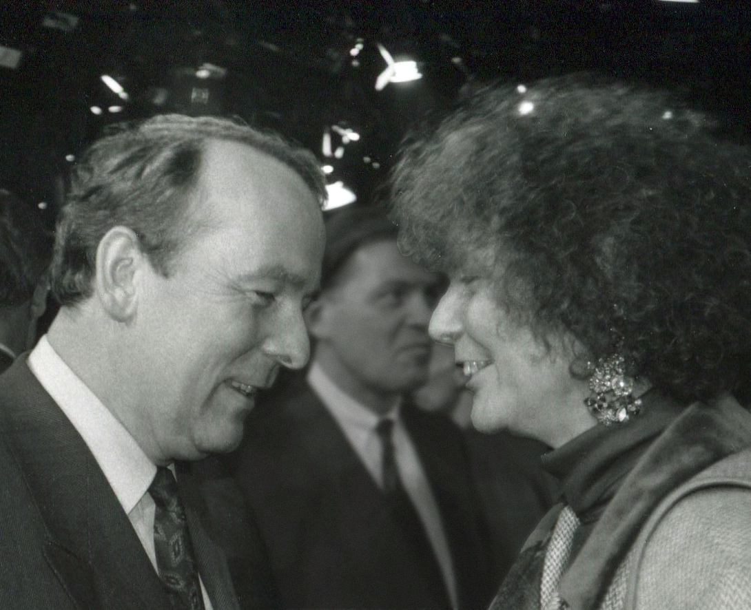 Hartmut Perschau im Gespräch mit der Europa-Abgeordneten Christa Randzio-Plath